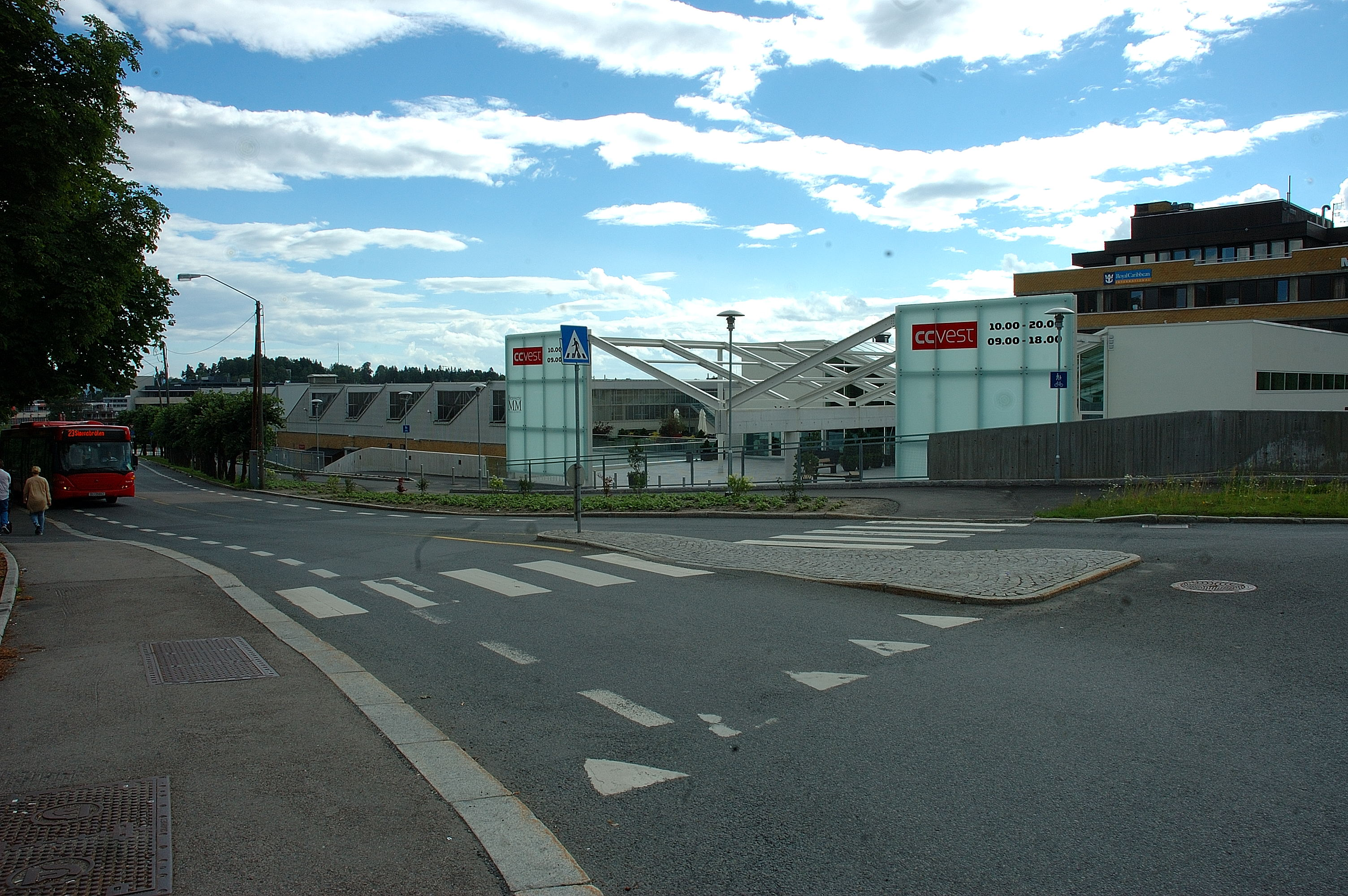 Shoppingcenter CC Vest in Oslo, Norway Kjøpesentret CC Vest i Oslo